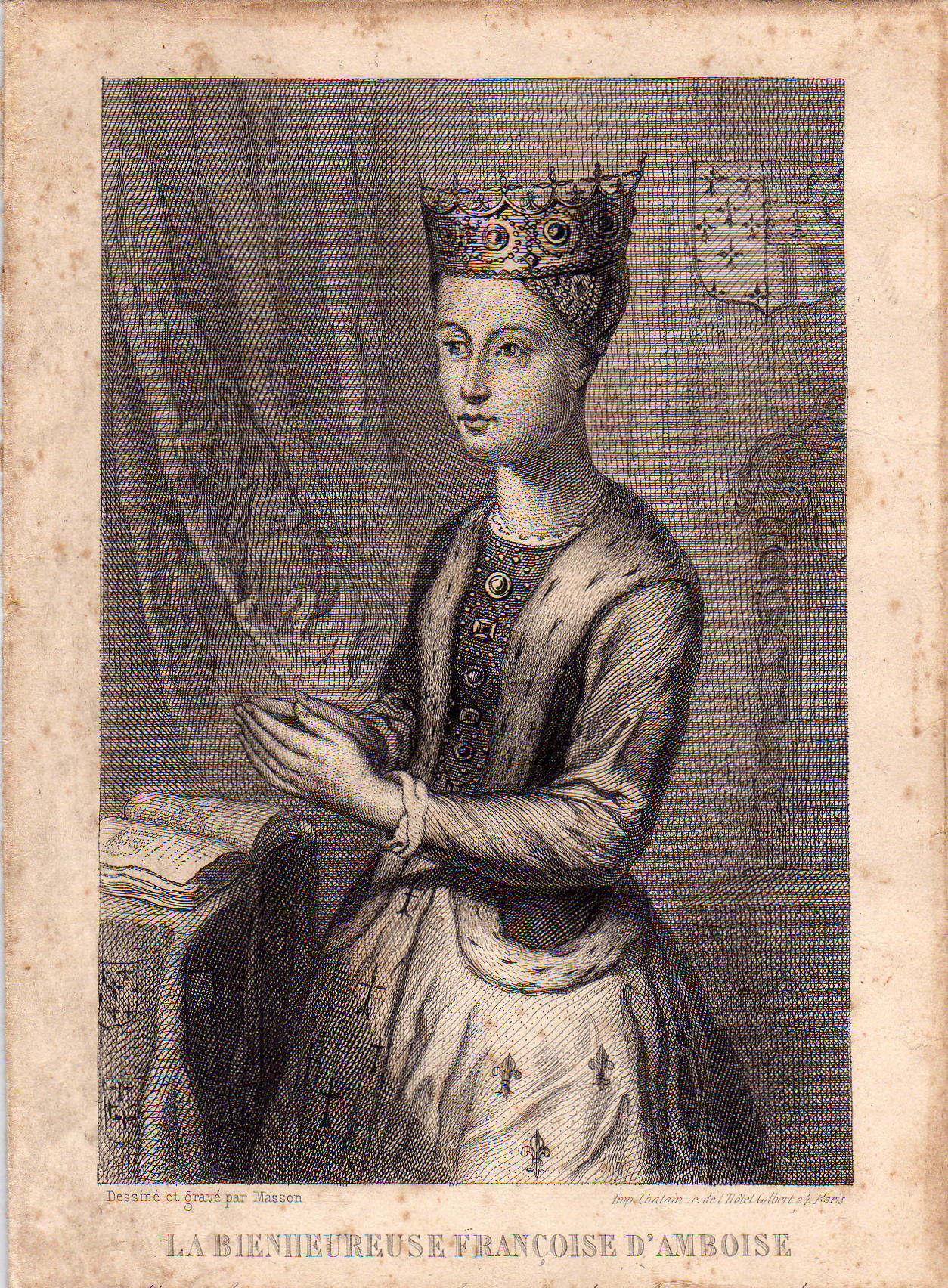 "La Bienheureuse Françoise d'Amboise"; Portrait de Françoise d'Amboise tiré d'un livre du XVIIIe siècle.